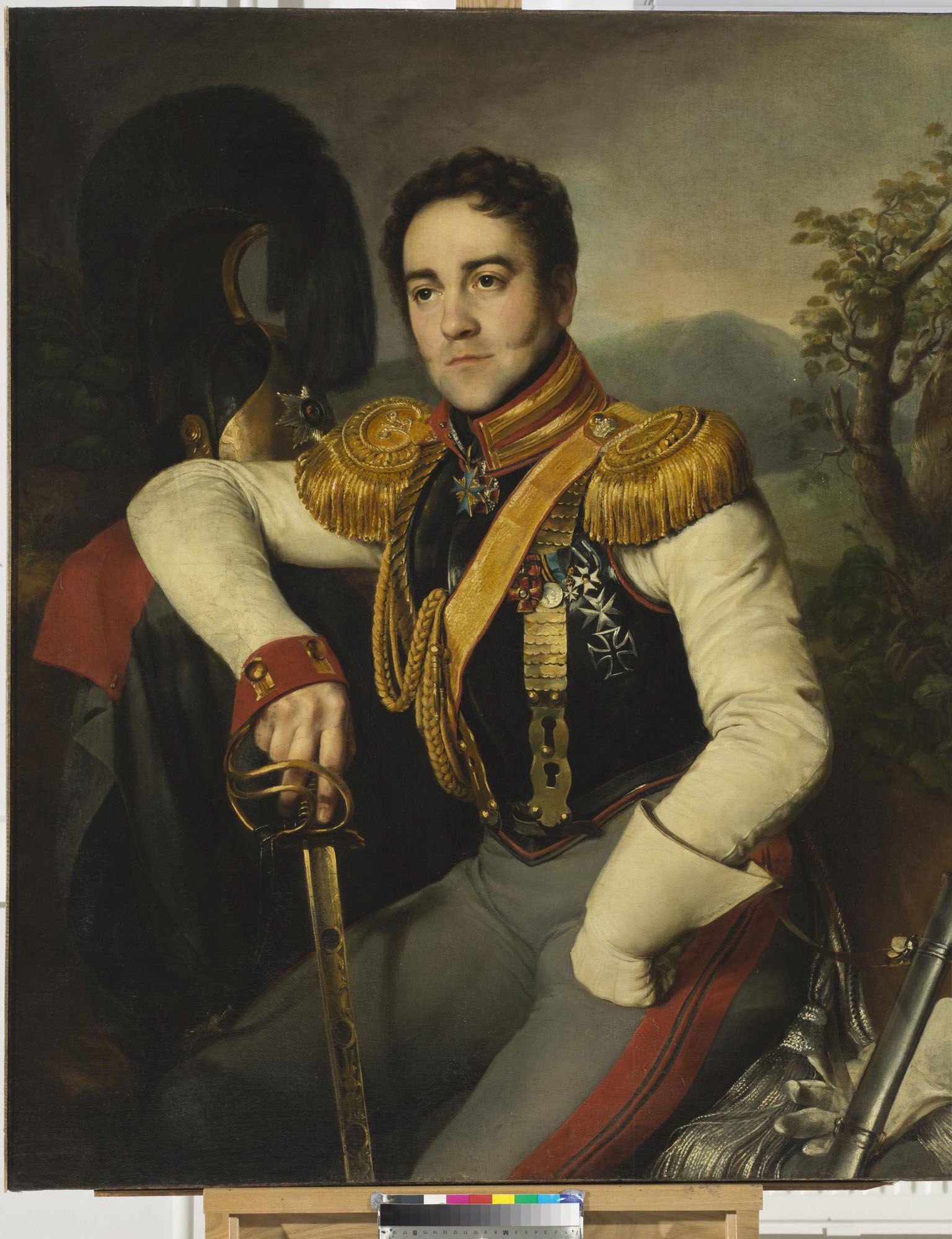 граф Владимир Степанович Апраксин (1796-1833) - участник Отечественной войны 1812 года и заграничного похода русской армии 1813-1814 гг. Внук Натальи Петровны Голицыной, знаменитой "princesse Moustache". На портрете изображен в форме полковника Лейб-гвардии Конного полка.